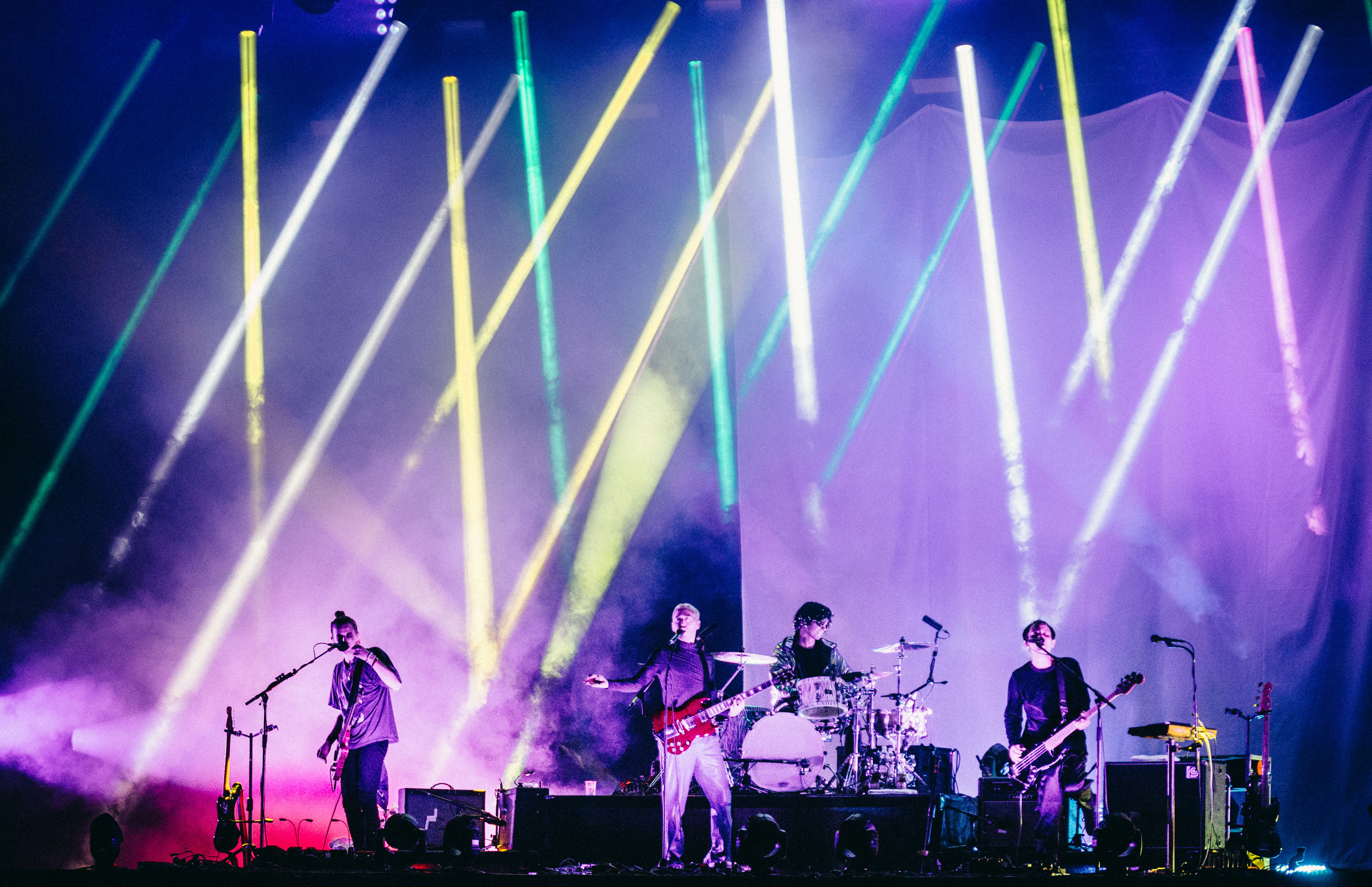 Bilderbuch am Air & Style-Festival 2017 in Innsbruck © Janick Entremont